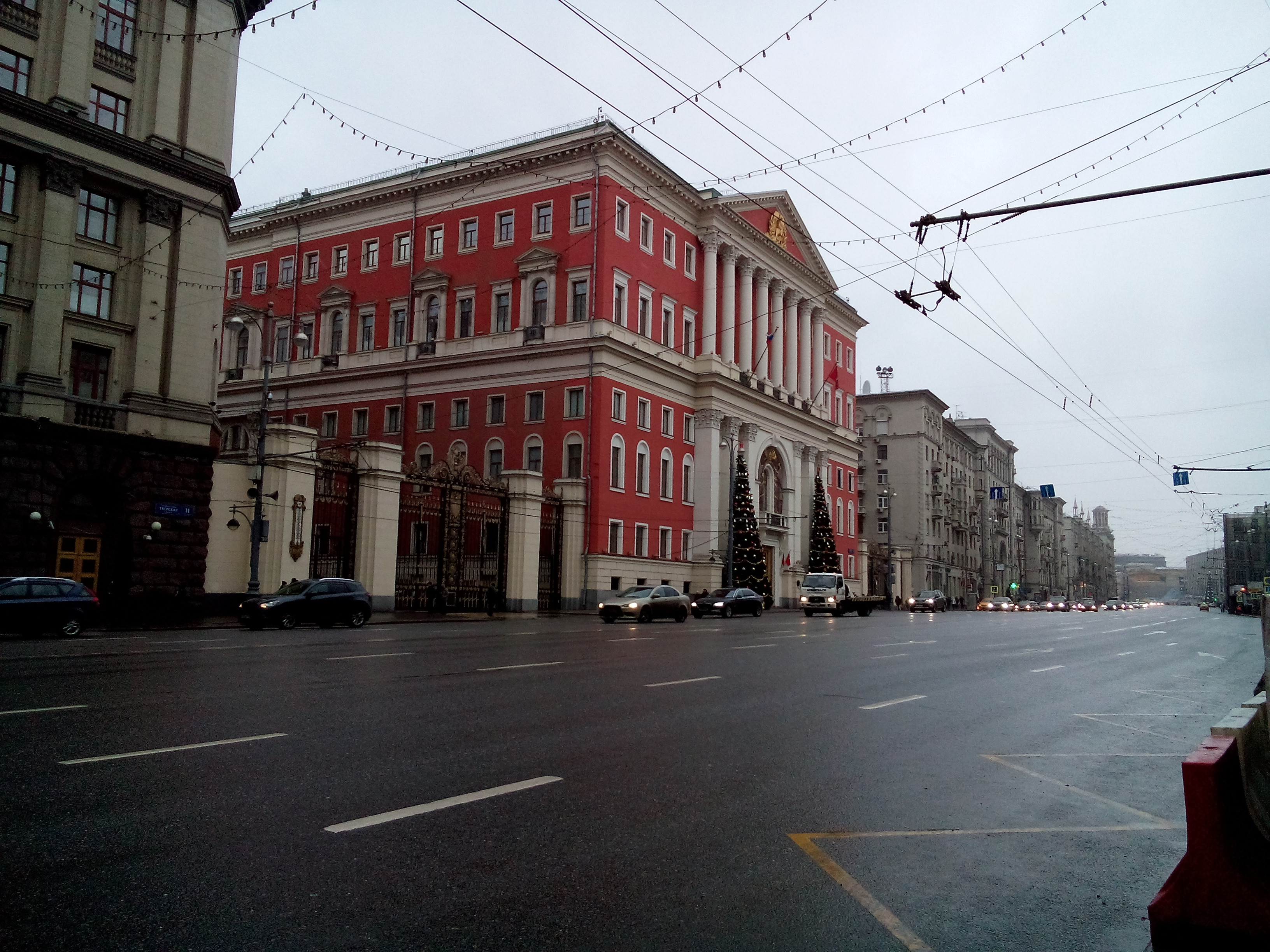 Россия